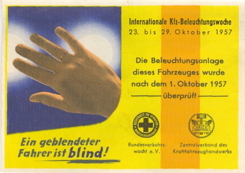 Die Licht-Test Plakette aus dem Jahr 1957 signalisierte der Polizei überprüftes Autolicht.